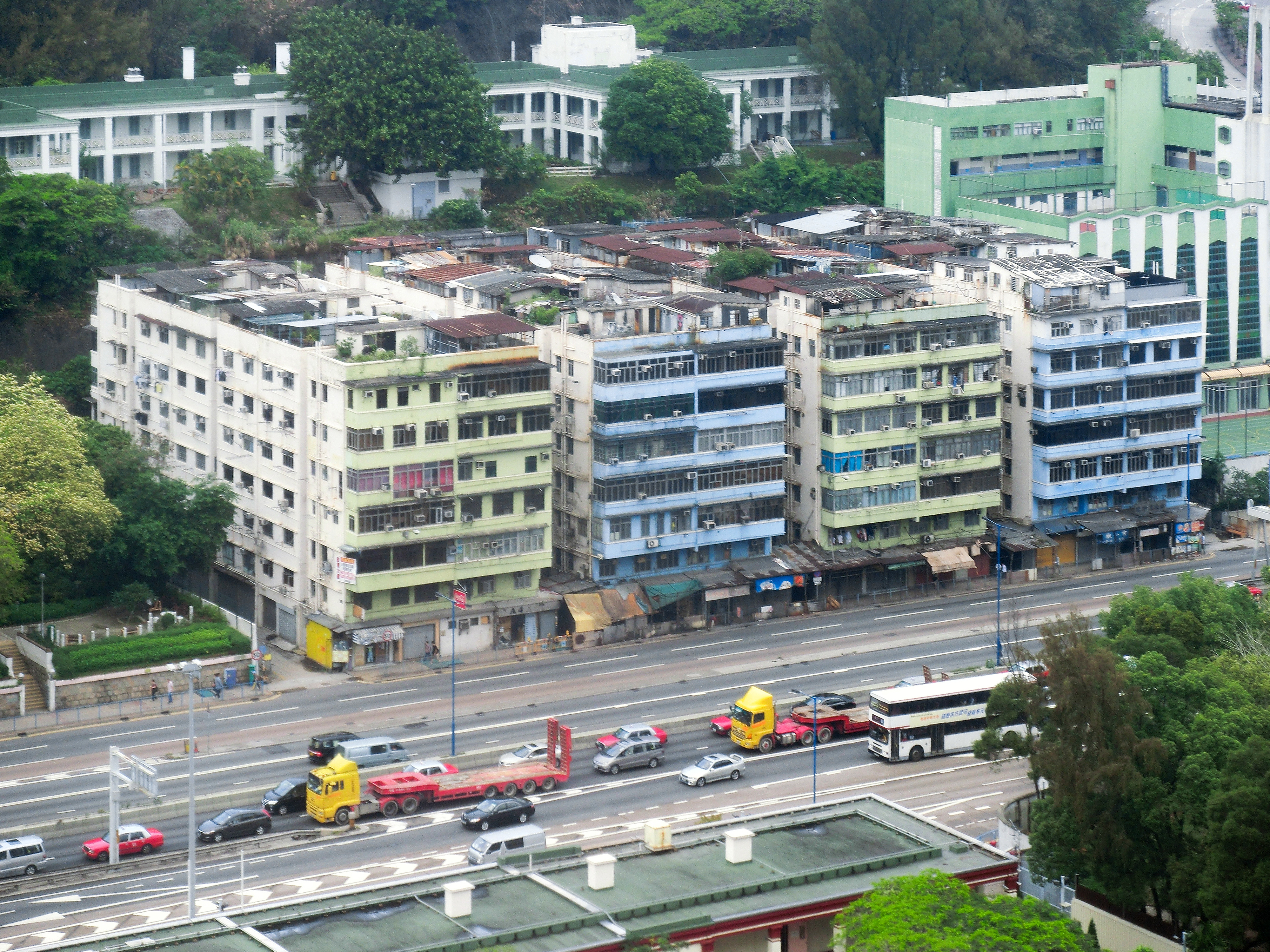 Hong Kong Kai Tak Mansion